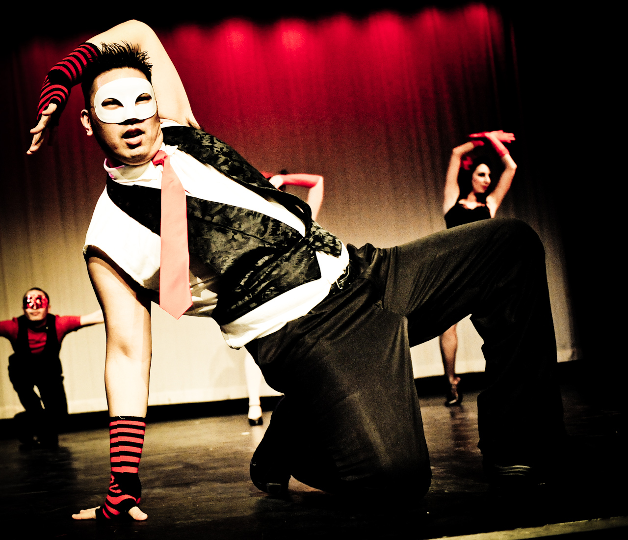 A dancer voguing